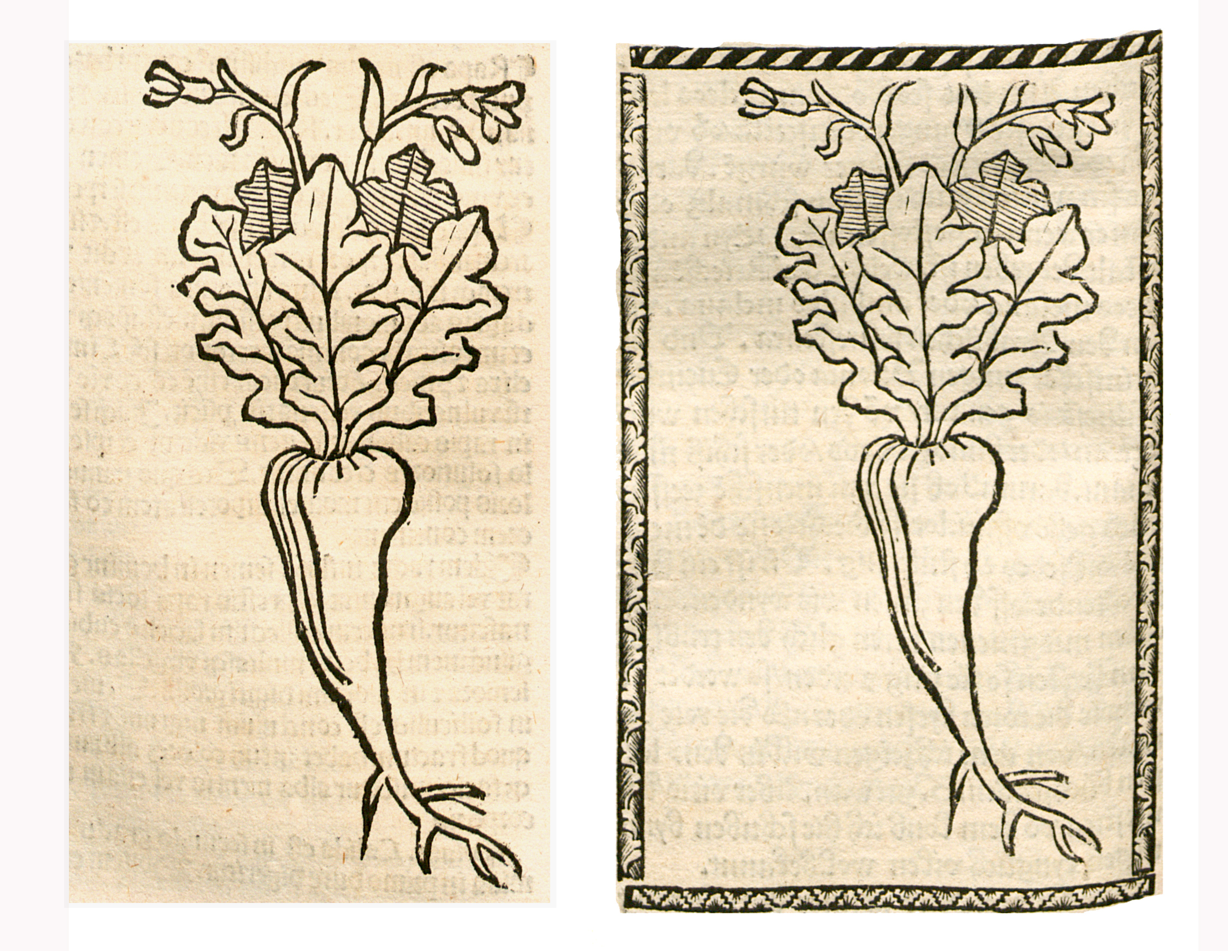 Abbildung von: Rettich (Raphanus sativus)